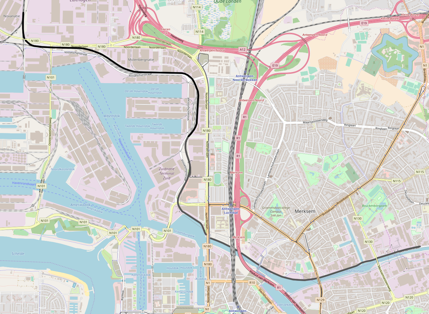 Belgian Railway Line 220, Y Noorderlaan - Merksem